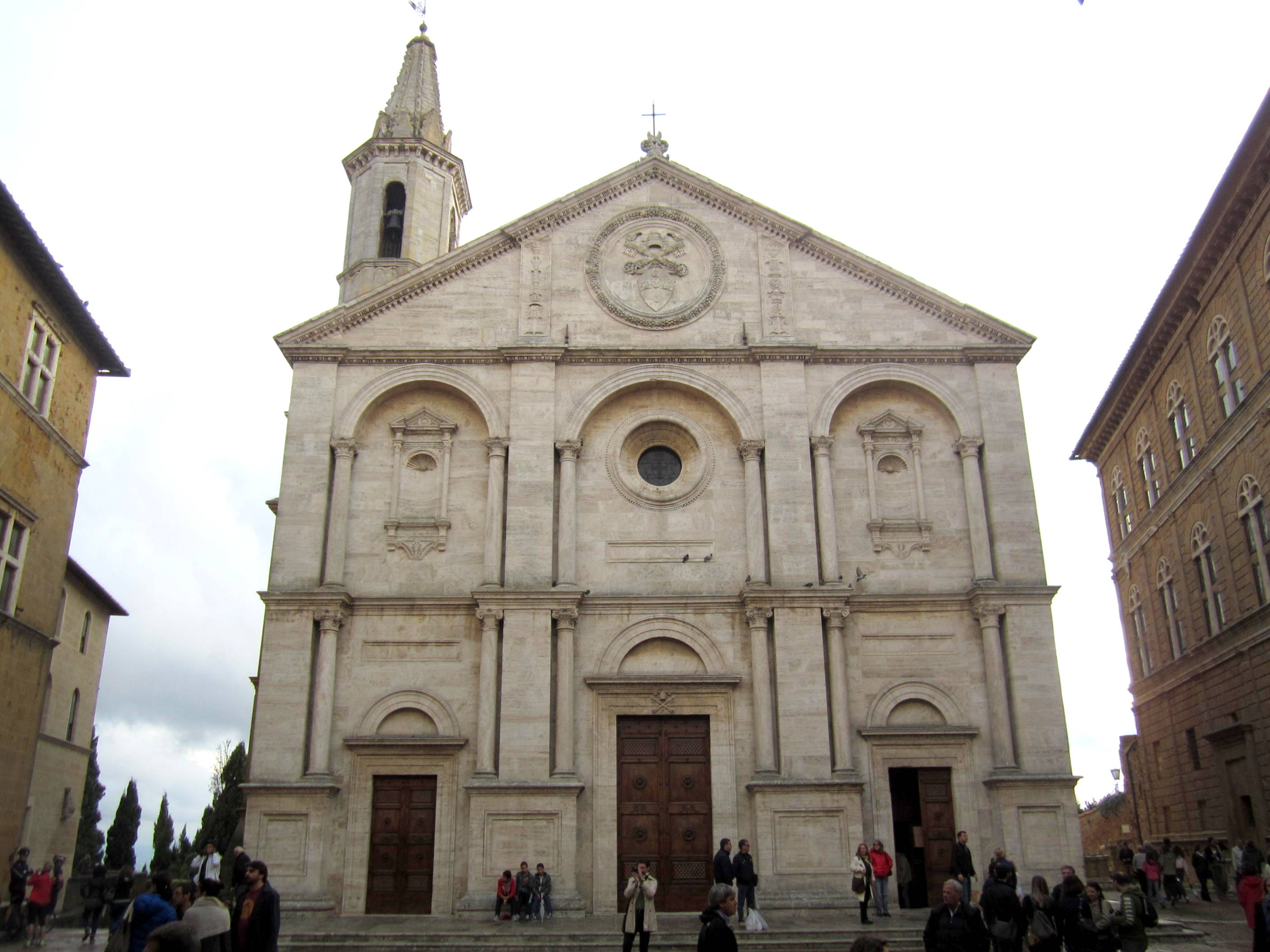 Duomo di Pienza